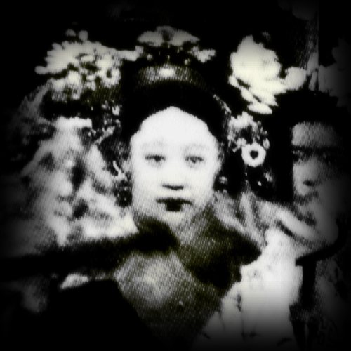 光绪瑾妃肖像